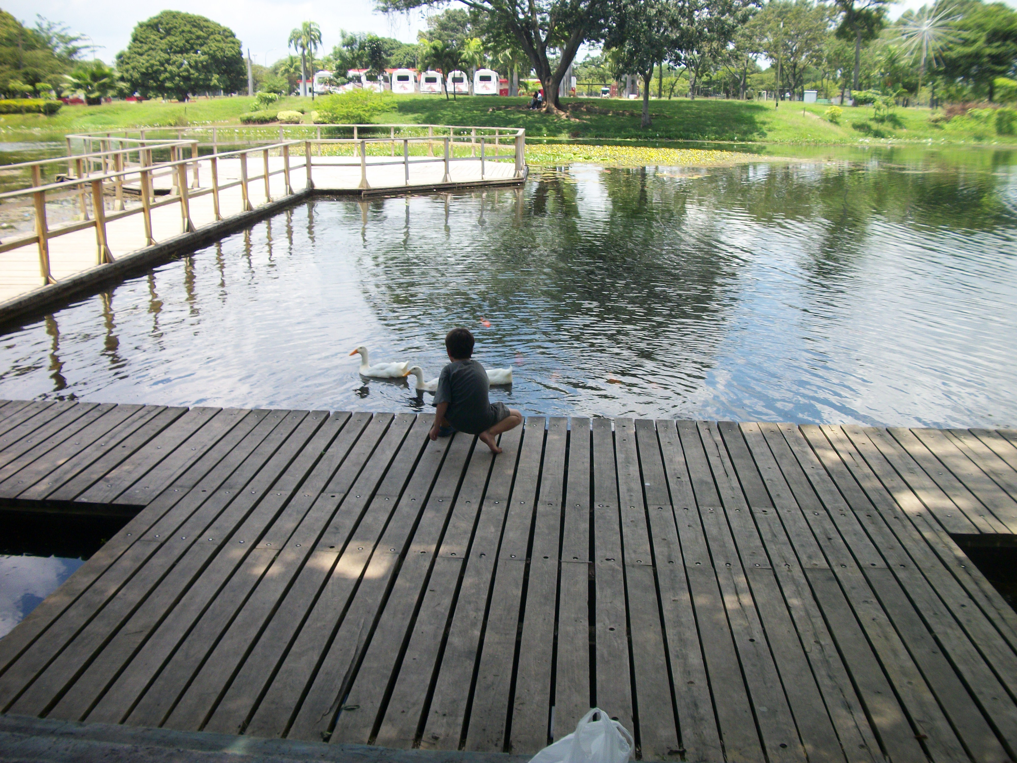 lago del parque recreacional